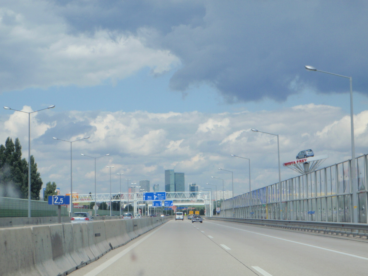 A2 autópálya Bécs irányába, közel a végcsomóponthoz